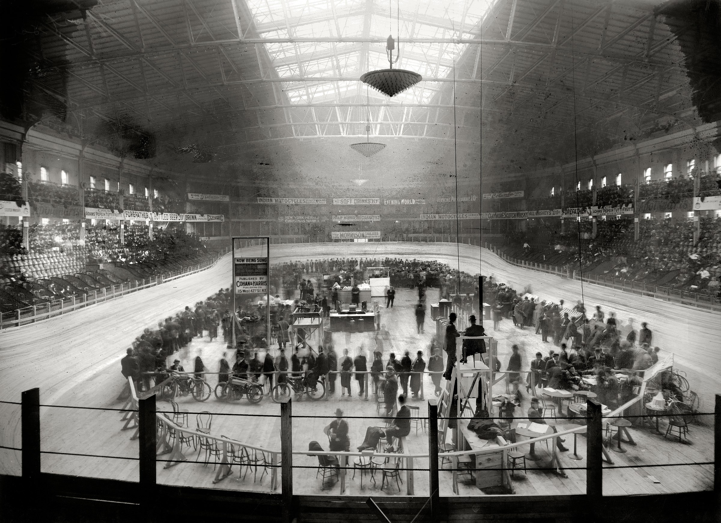 Six jours de New-York, Madison Square Garden